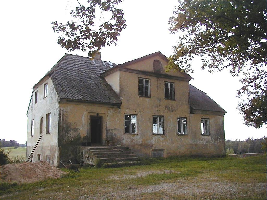 Lodes muiža Aronas pagastā 2001-08-25